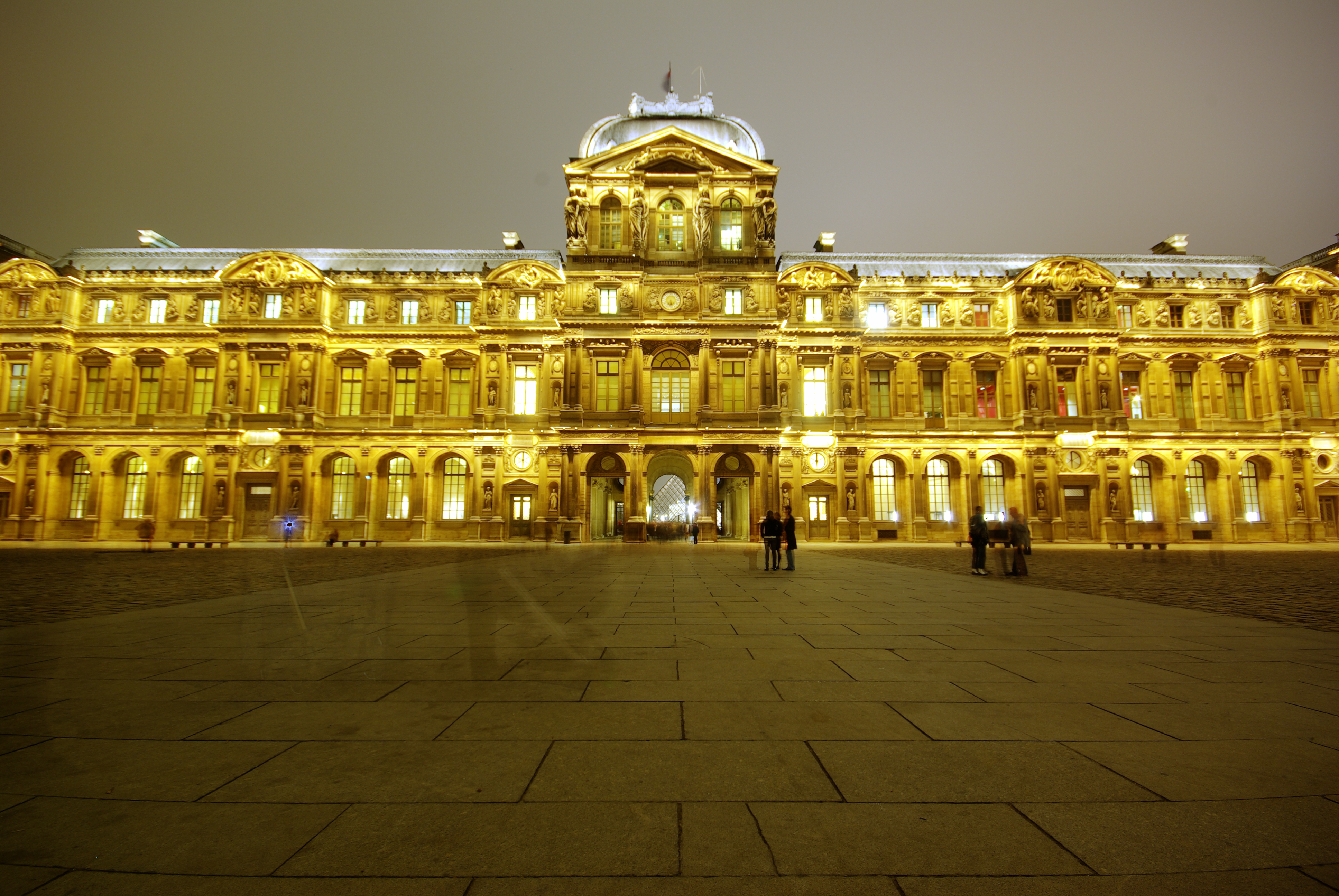 Louvre